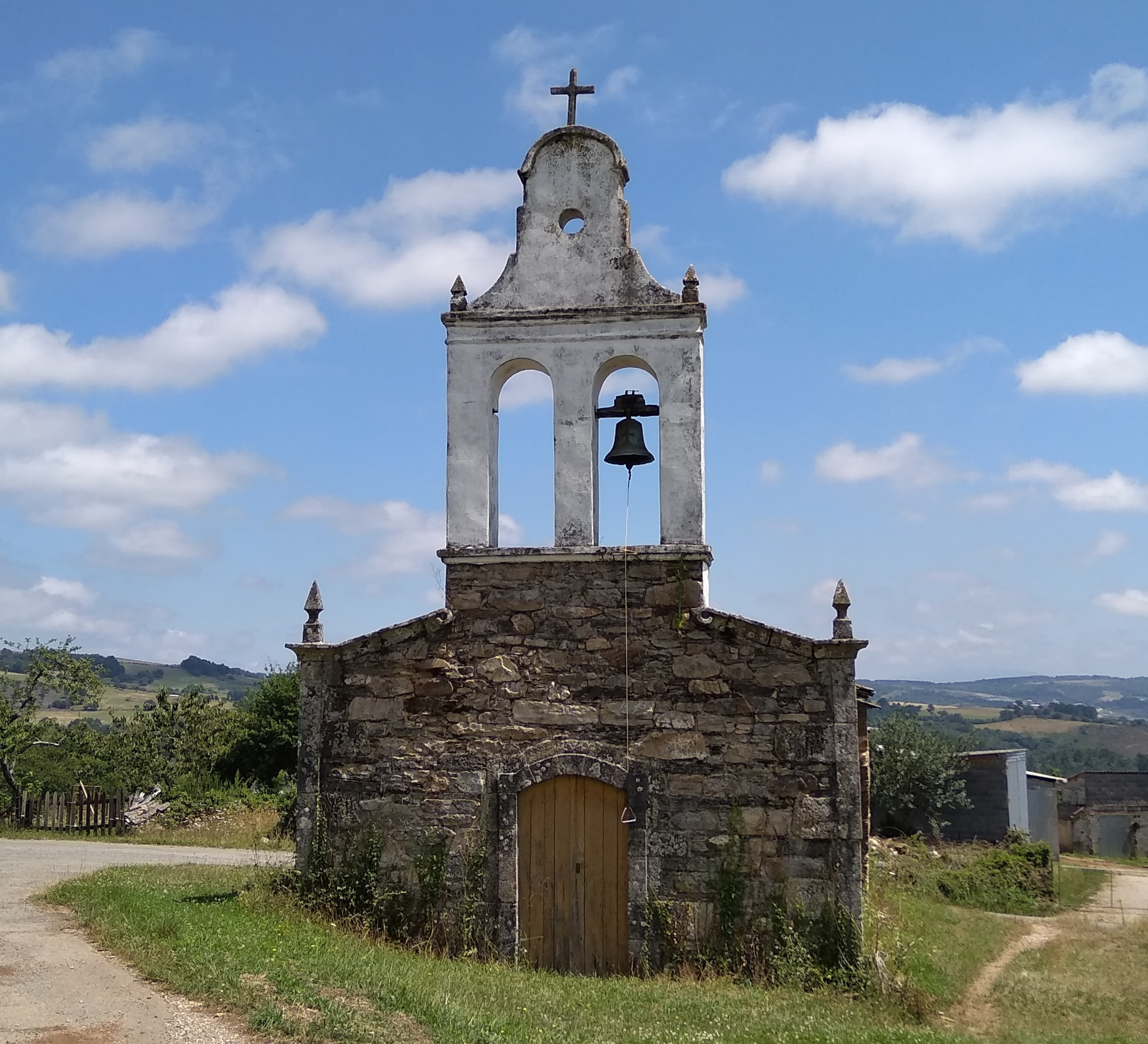 Igrexa na parroquia de San Bartolomeu de Vilarbuxán, no concello lucense de Bóveda